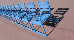 Chaises bleues soudées en rang Promenade des anglais Nice France